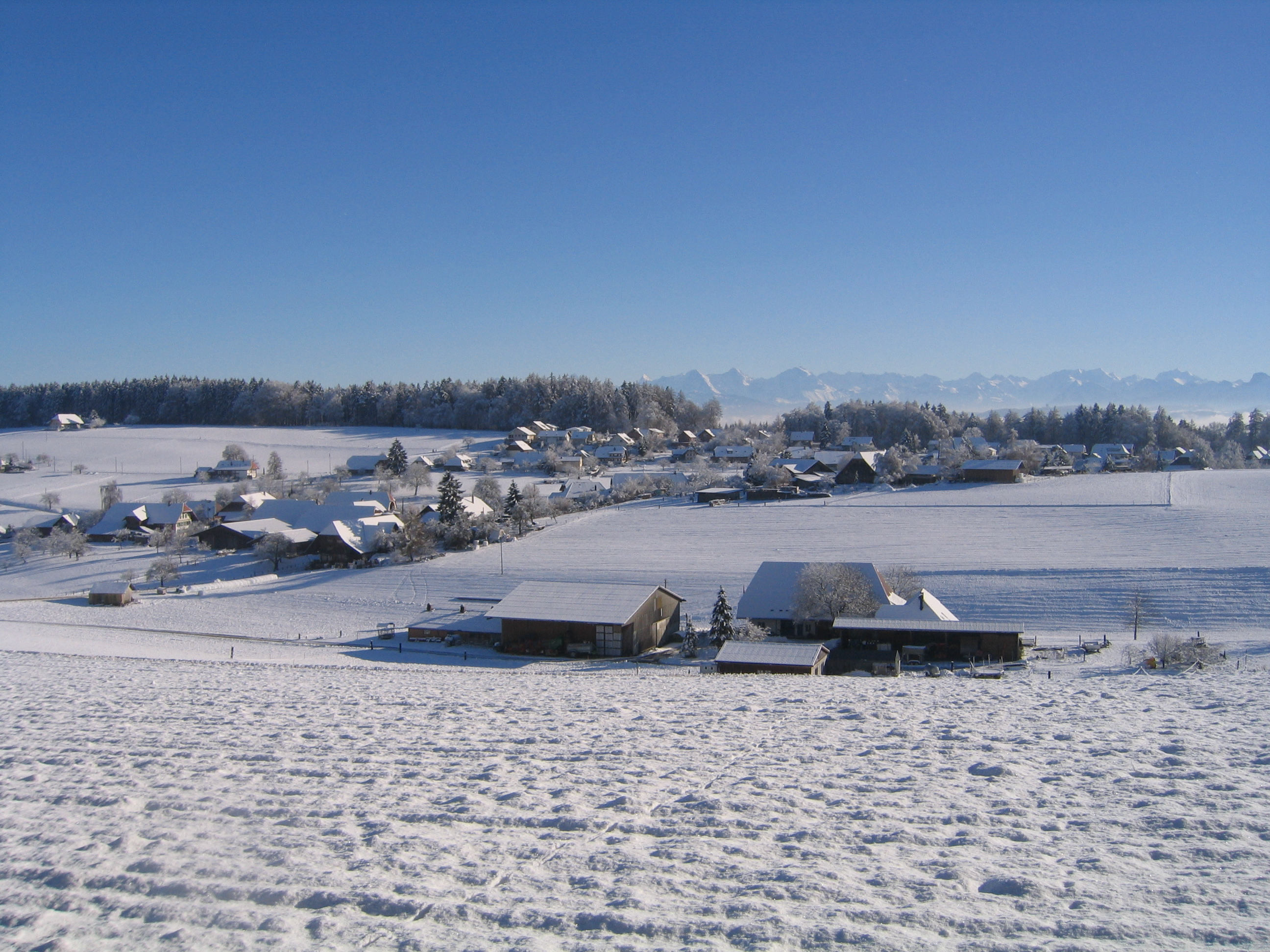 Blick auf Wahlendorf in der Gemeinde Meikirch.